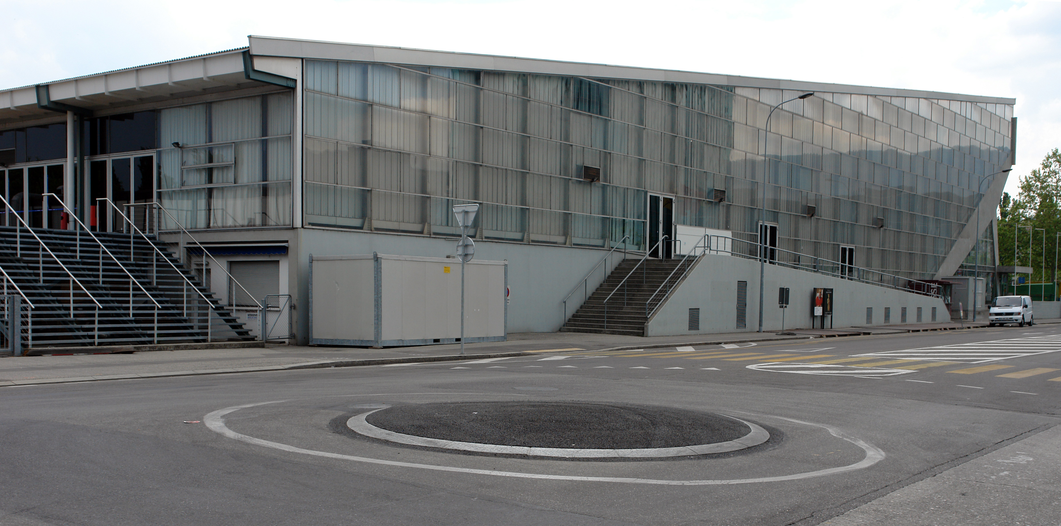 Les Vernets in Geneva, Switzerland, Ice Stadium Architect: Cingria+Maurice, Year: 1958-66